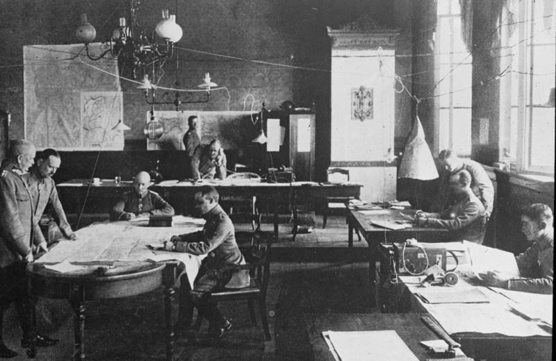 [1. Weltkrieg] Vormarsch in Polen und Rußland Im Hauptquartier